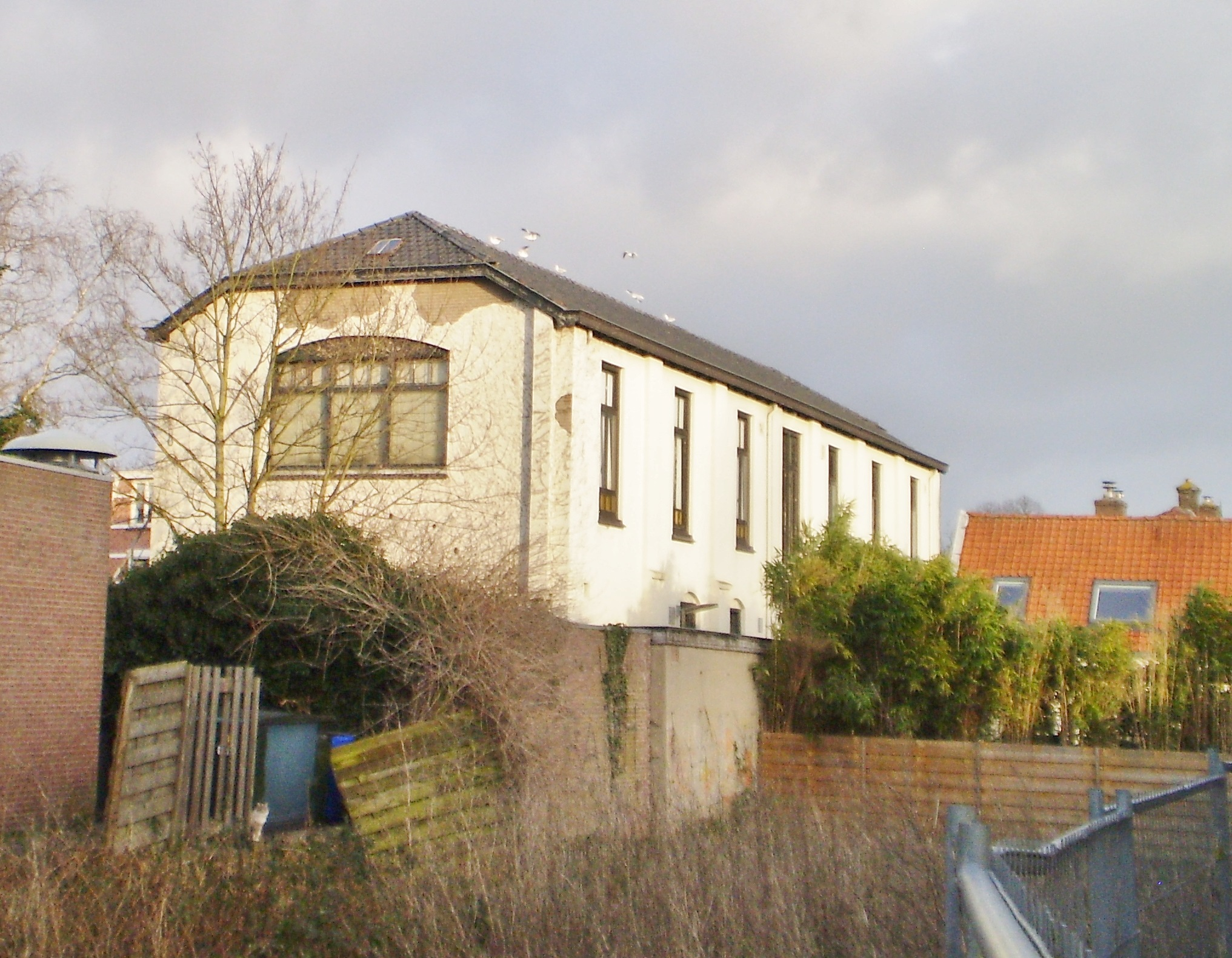 Gezien vanaf de Hoofdstraat naast Onder de Linden